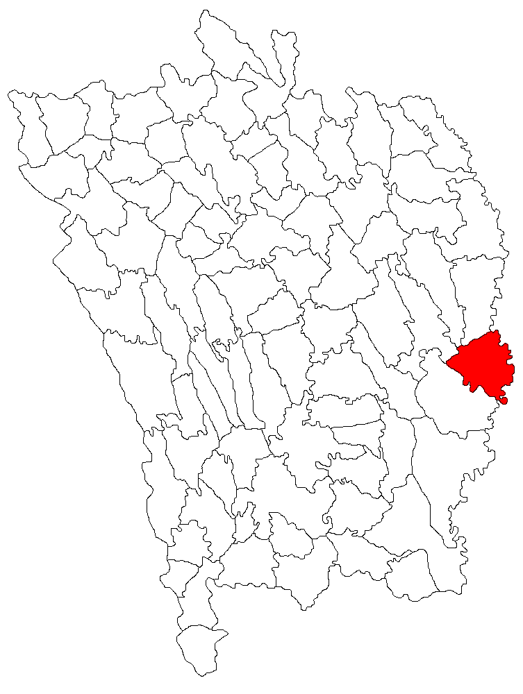 Categorie:Hărţi ale judeţului Vaslui